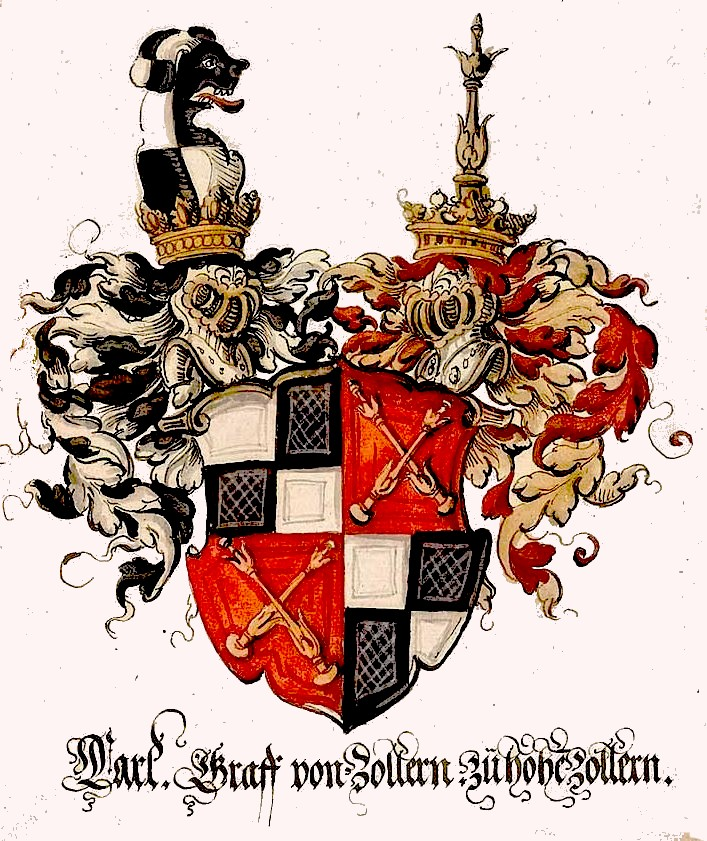 Wappen Carl Graff von Zollern zu Hohenzollern aus einem unbekanntem Wappenbuch